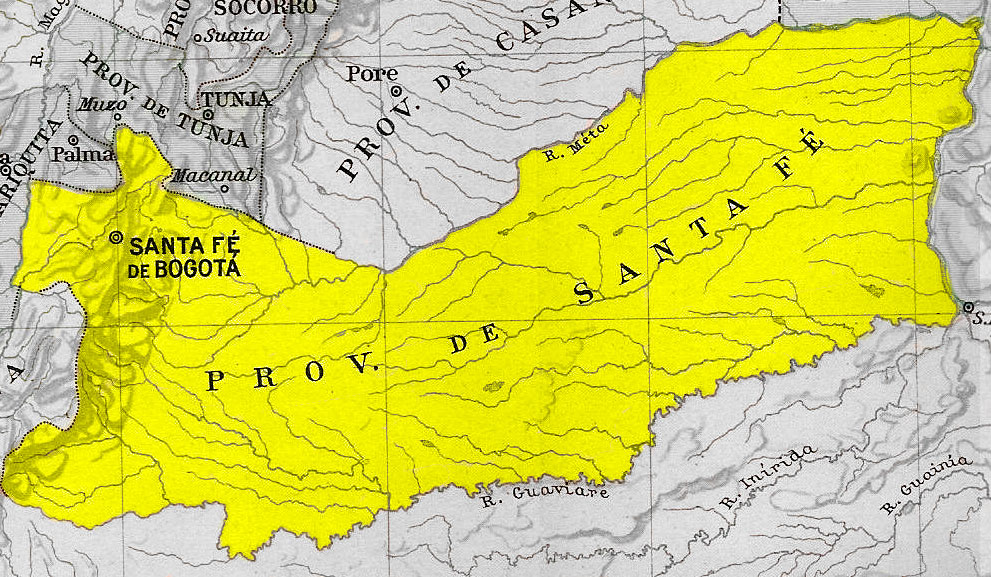 Mapa de la Provincia de Santa Fe de Bogotá en 1810 y 1830